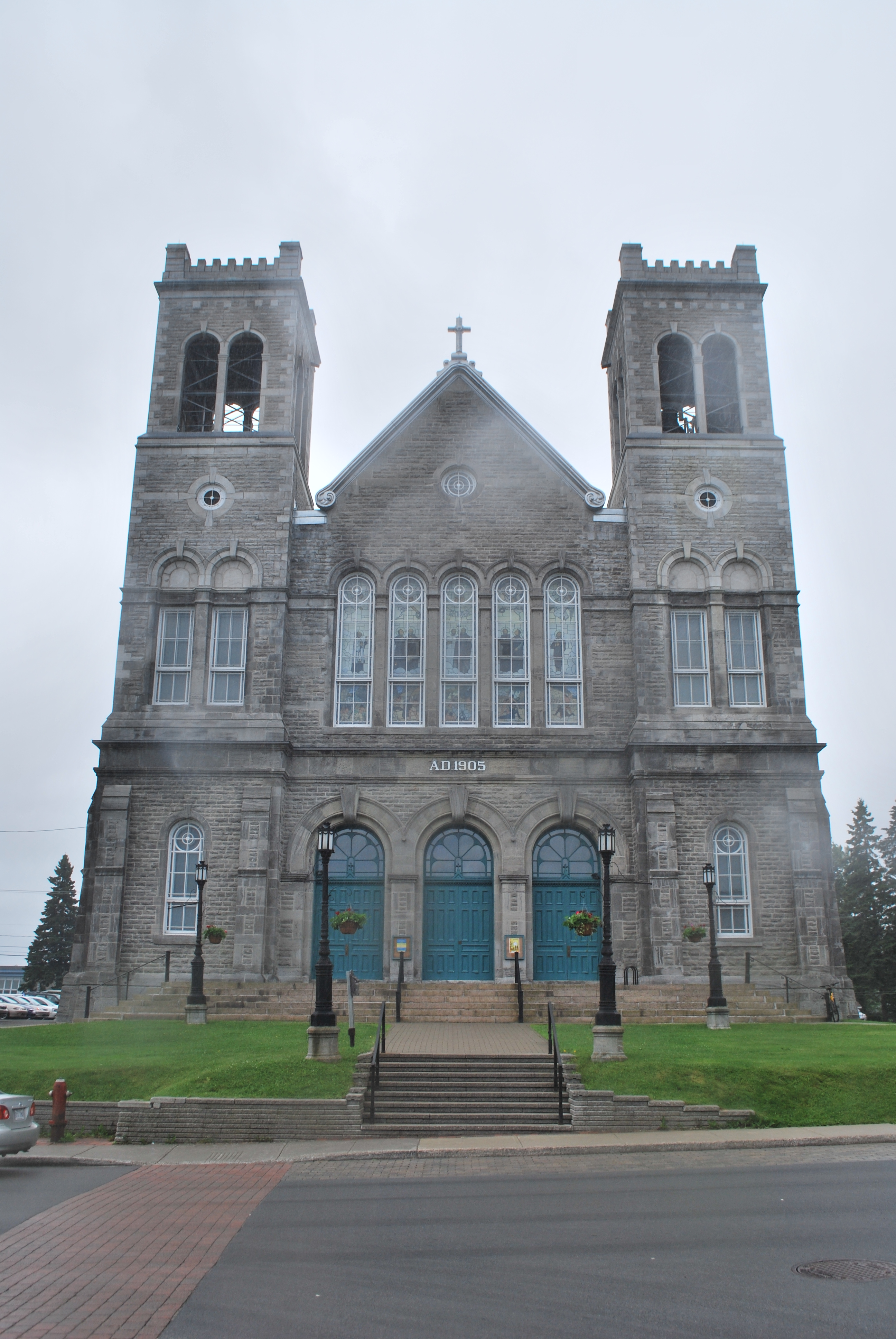 Laurentides Église de Sainte-Agathe-des-Monts, au Québec.